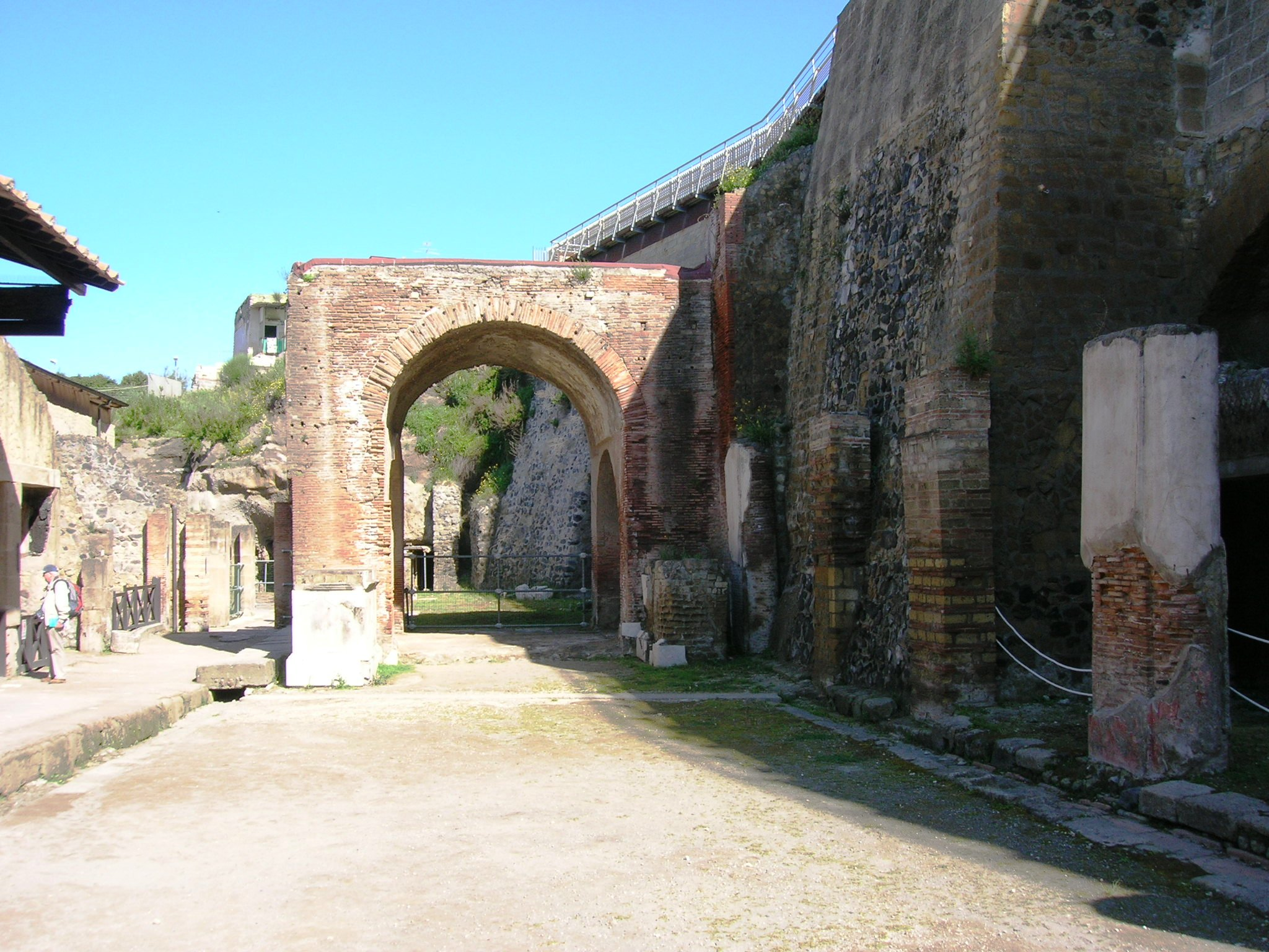 Basilica